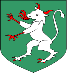 de sinople à une panthère d’argent, armée et accornée de gueules, crachant des flammes du même, qui est de Styrie